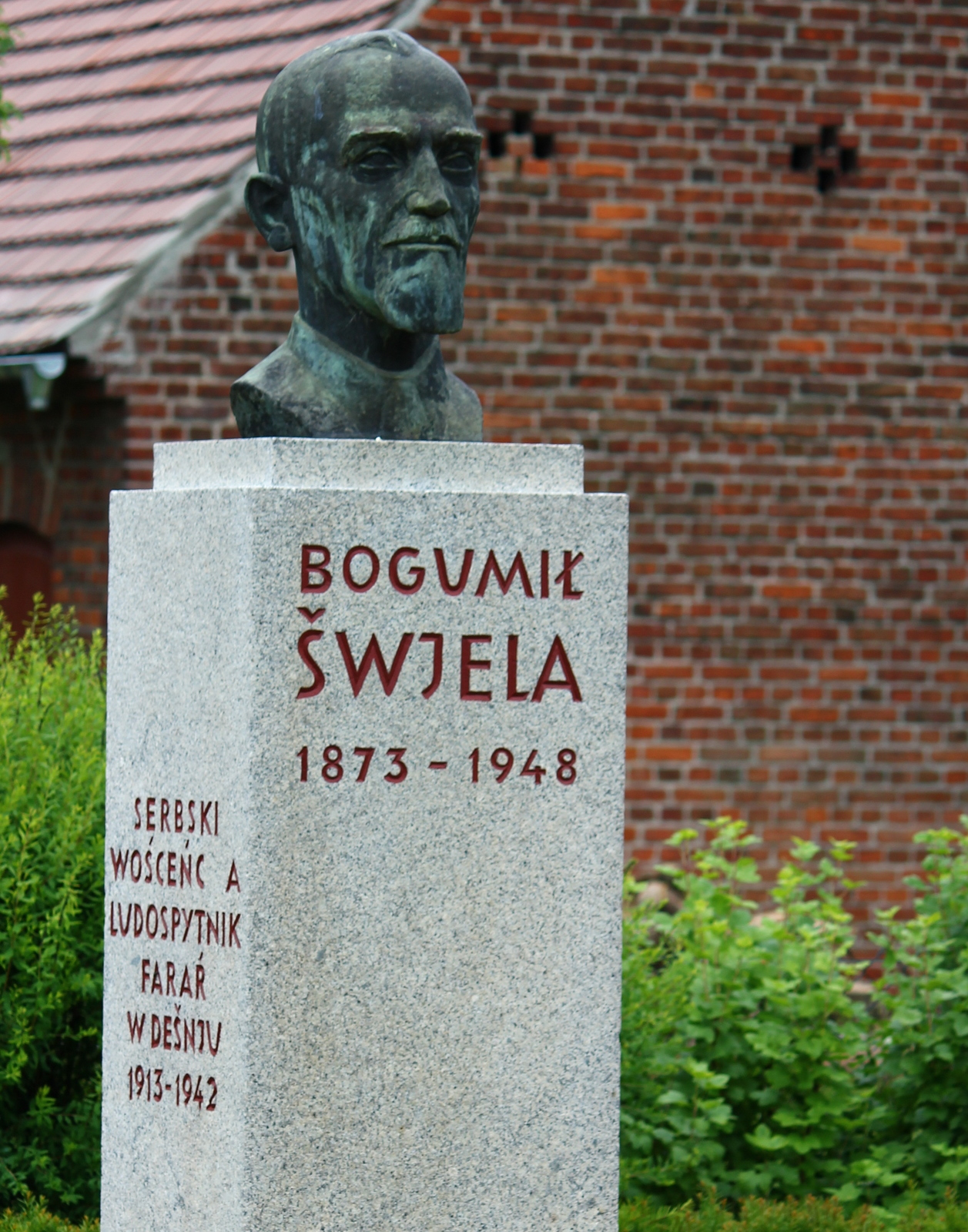 Büste von Bogumił Šwjela in Dissen/Dešno, Landkreis Spree-Neiße, Brandenburg. Hornjoserbsce: Bista fararja Bogumiła Šwjele w Dešnje, wokrjes Sprjewja-Nysa, Braniborska.